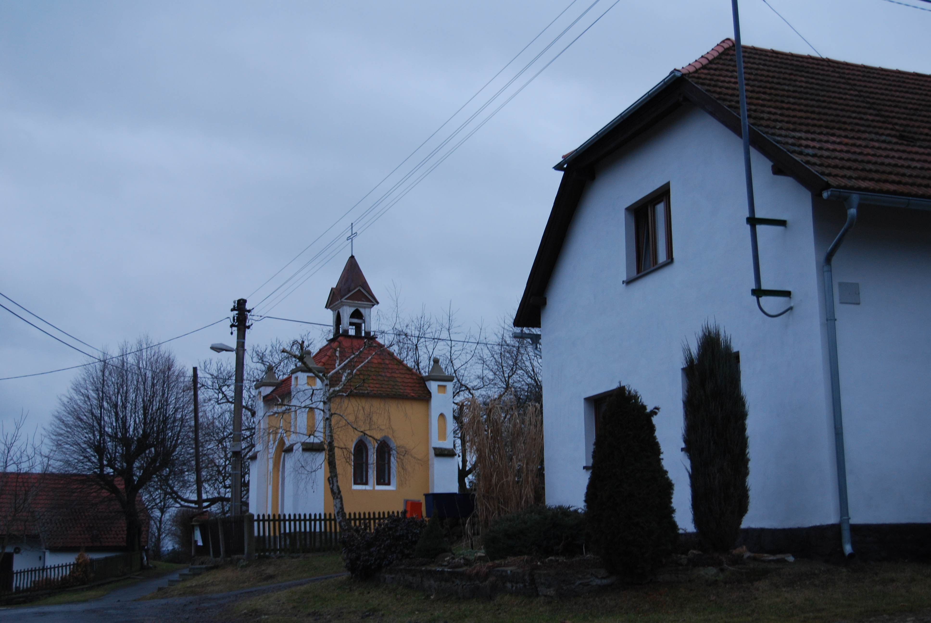 Kaple se zvoničkou ve vesnici. Bratříkovice je část obce Nechvalice v okrese Příbram. Česká republika.